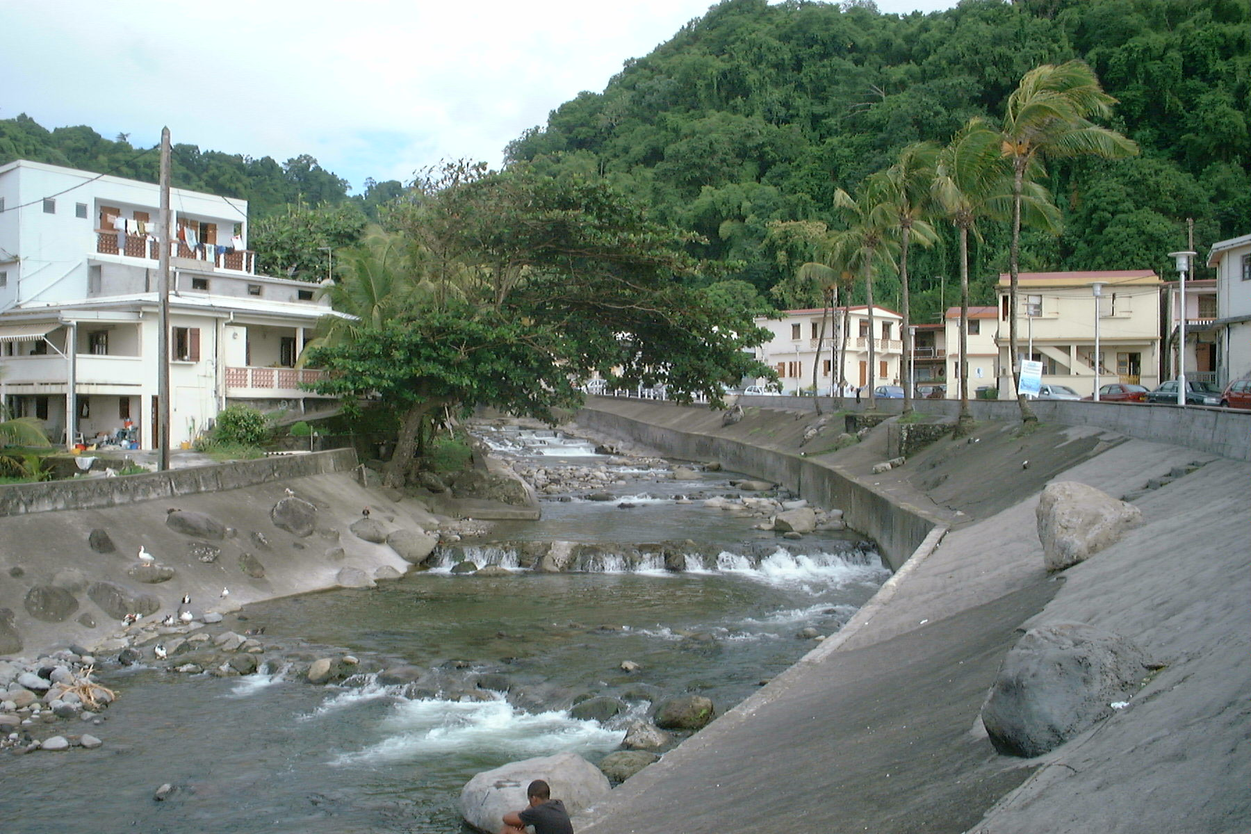 Description:La ville de Grand'Rivière en Martinique Source: personal photo